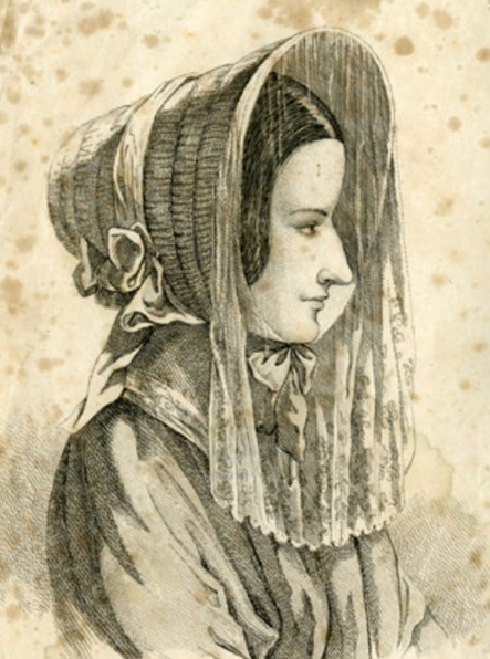 Marie Lafarge, frontispice de Memoirs of Madame Lafarge, Philadelphia: Carey and Hart, 1841.